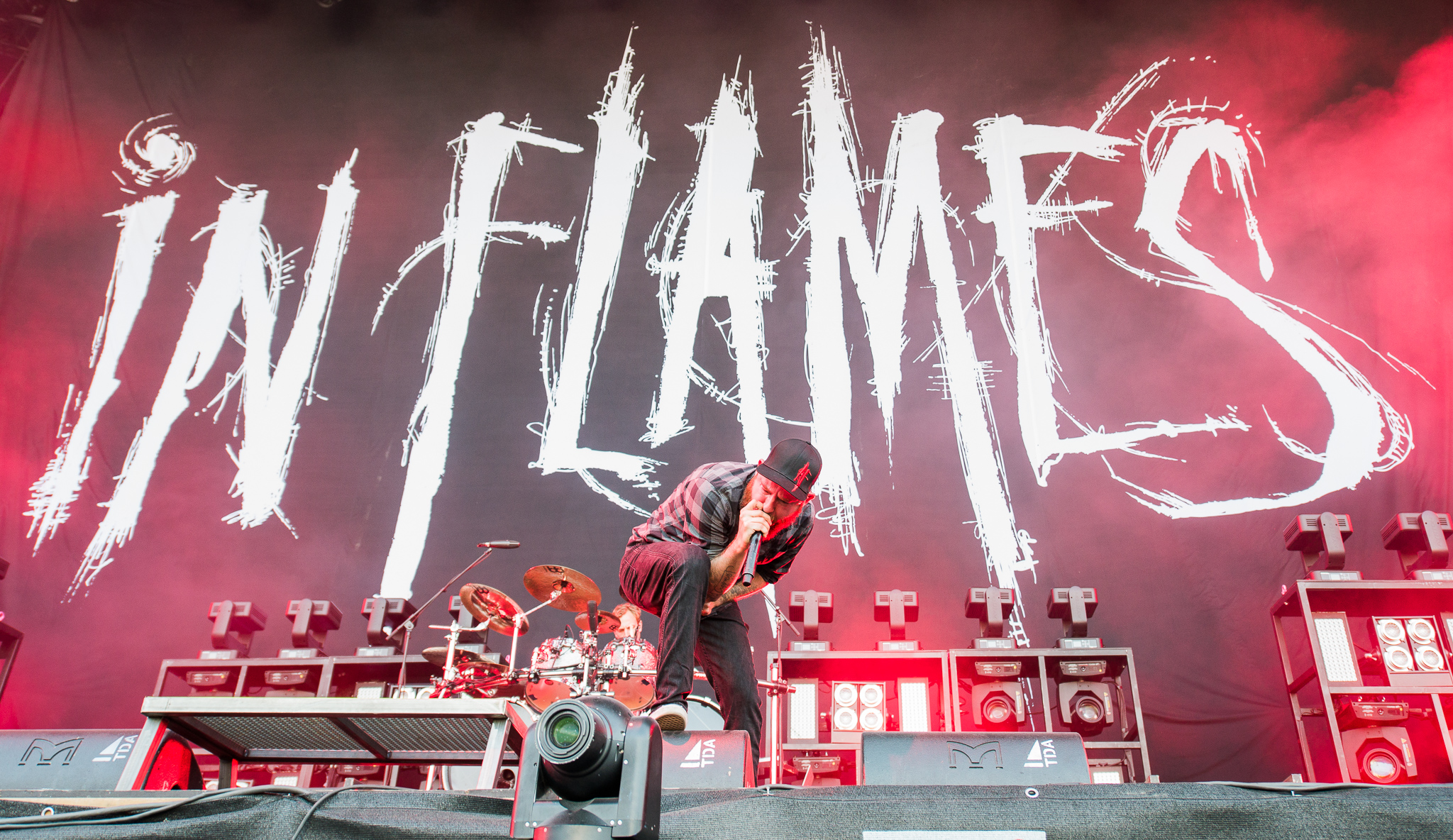 ARGO-Konzerte,Anders Fridén,Beck's Park Stage,Festival,In Flames,Konzert,Livekonzert,Livemusik,Musik,RiP,Rock im Park 2015